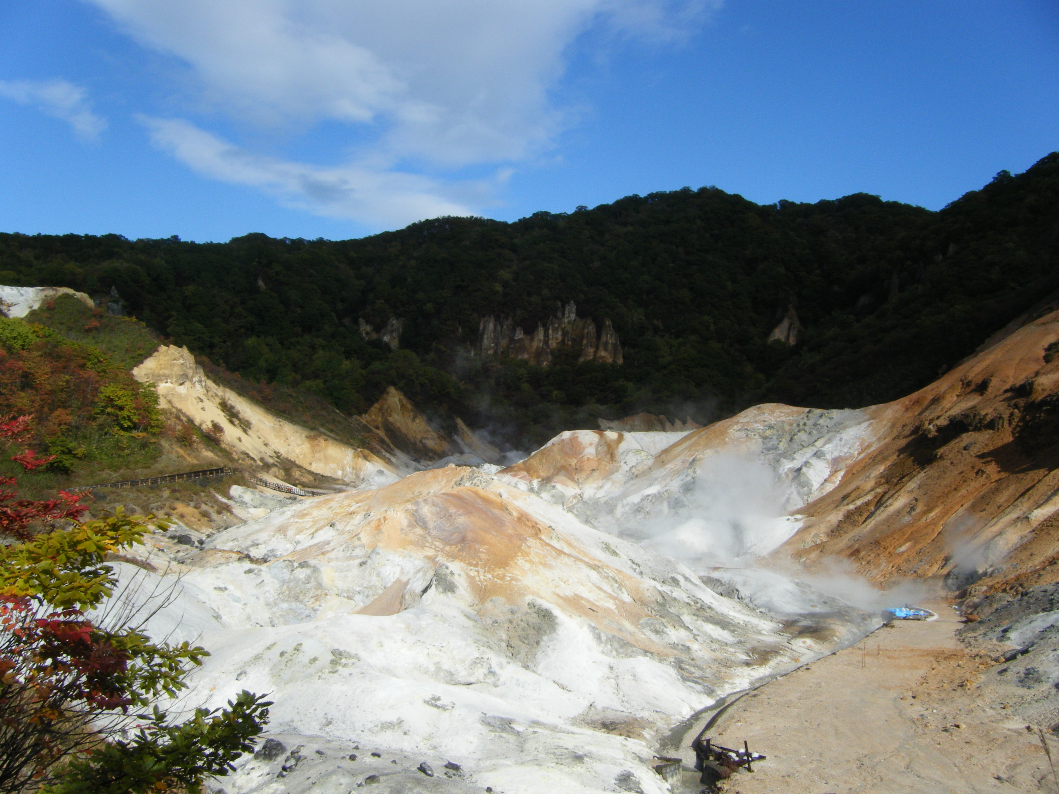 登別温泉地獄谷散策路より。